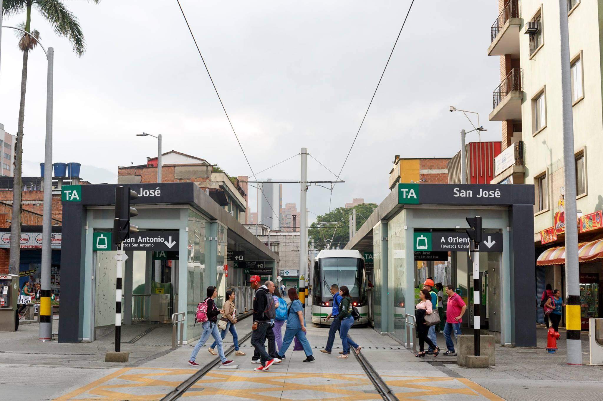 Estación San José (Metro de Medellín)